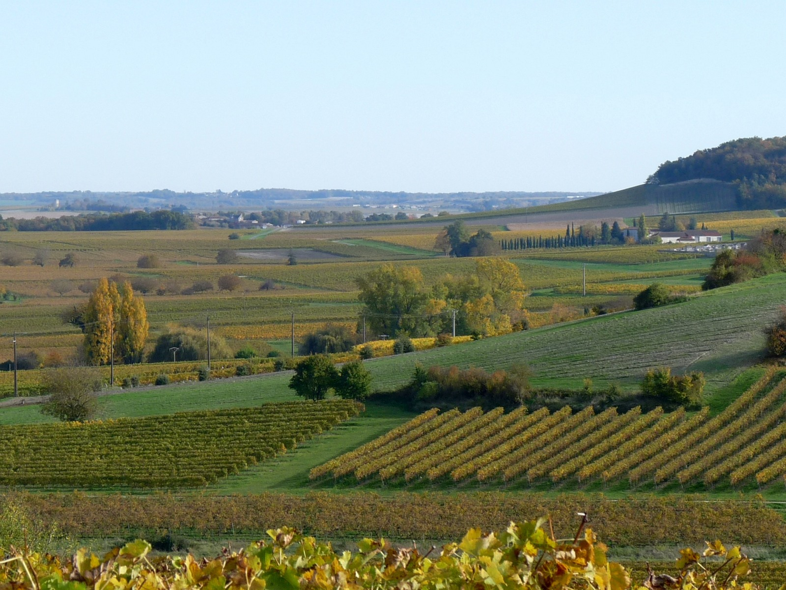 Cuesta et vignoble, Bouteville, Charente, France